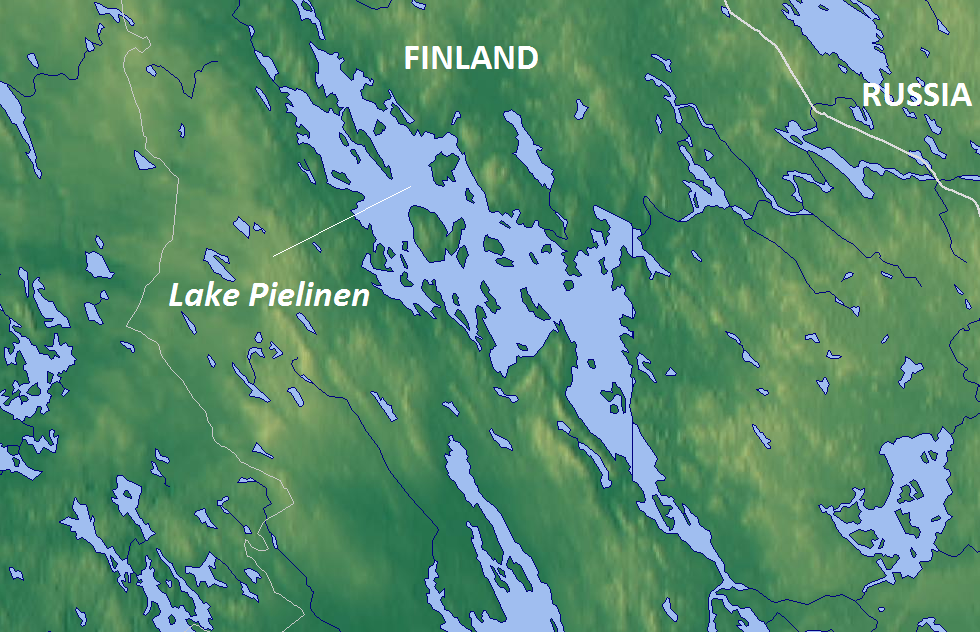 Map of Pieninen lake, Finland